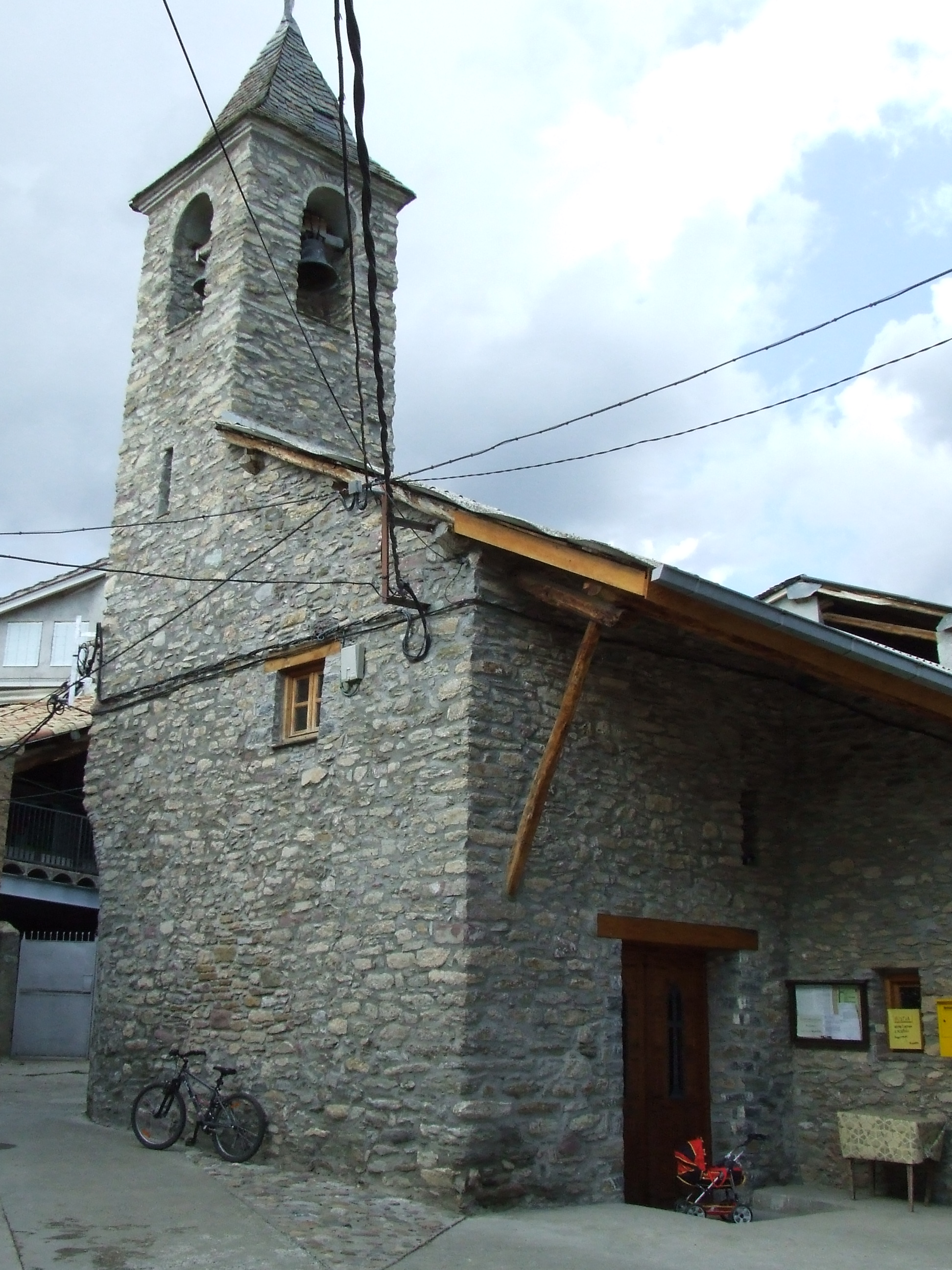 Sant Miquel de Pobellà (la Torre de Cabdella, Pallars Jussà)